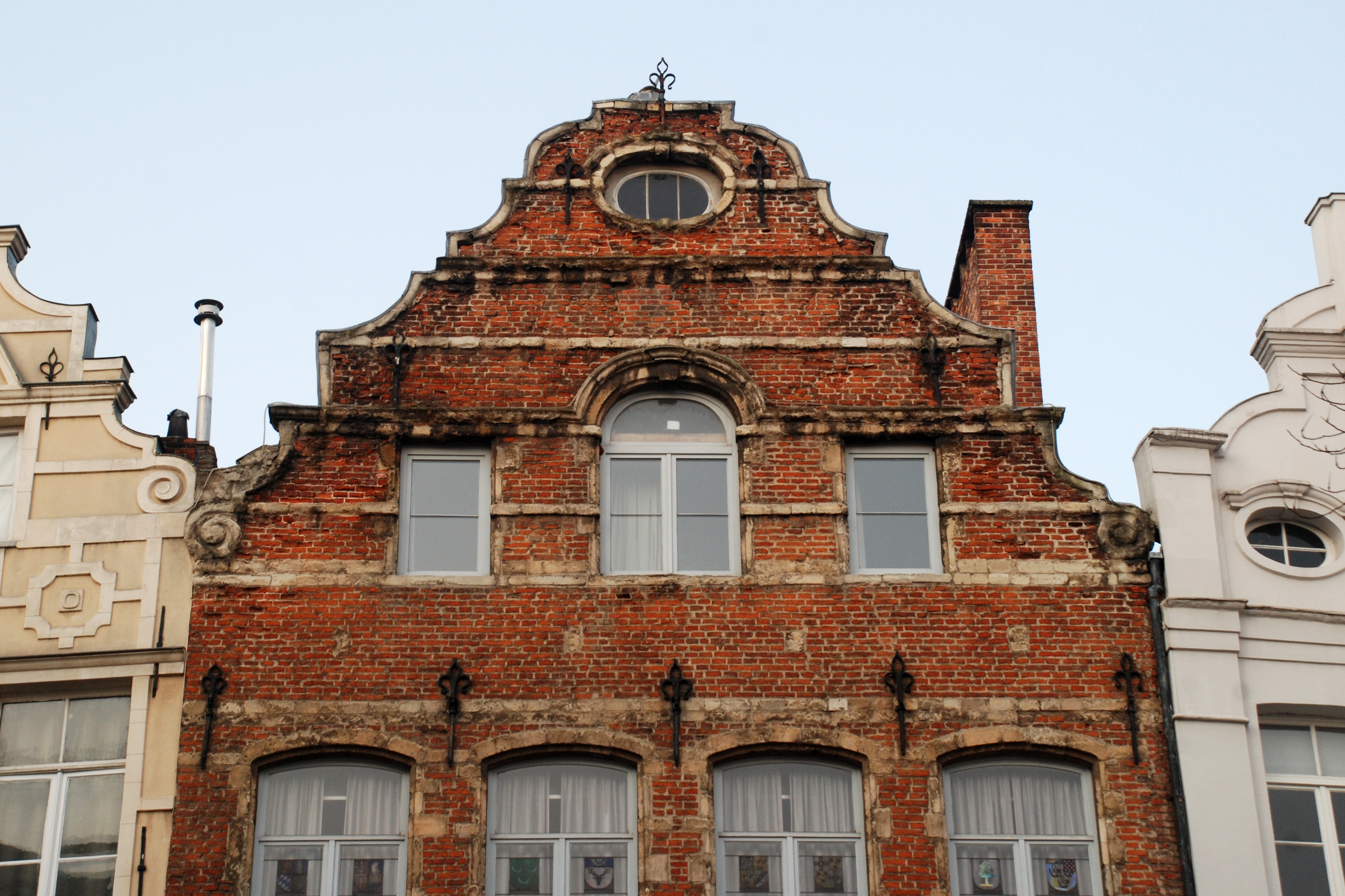 Belgique - Bruxelles - Place de la Vieille Halle aux Blés n°30 - Maison de l'Étoile d'Or (De Gulde Sterre)